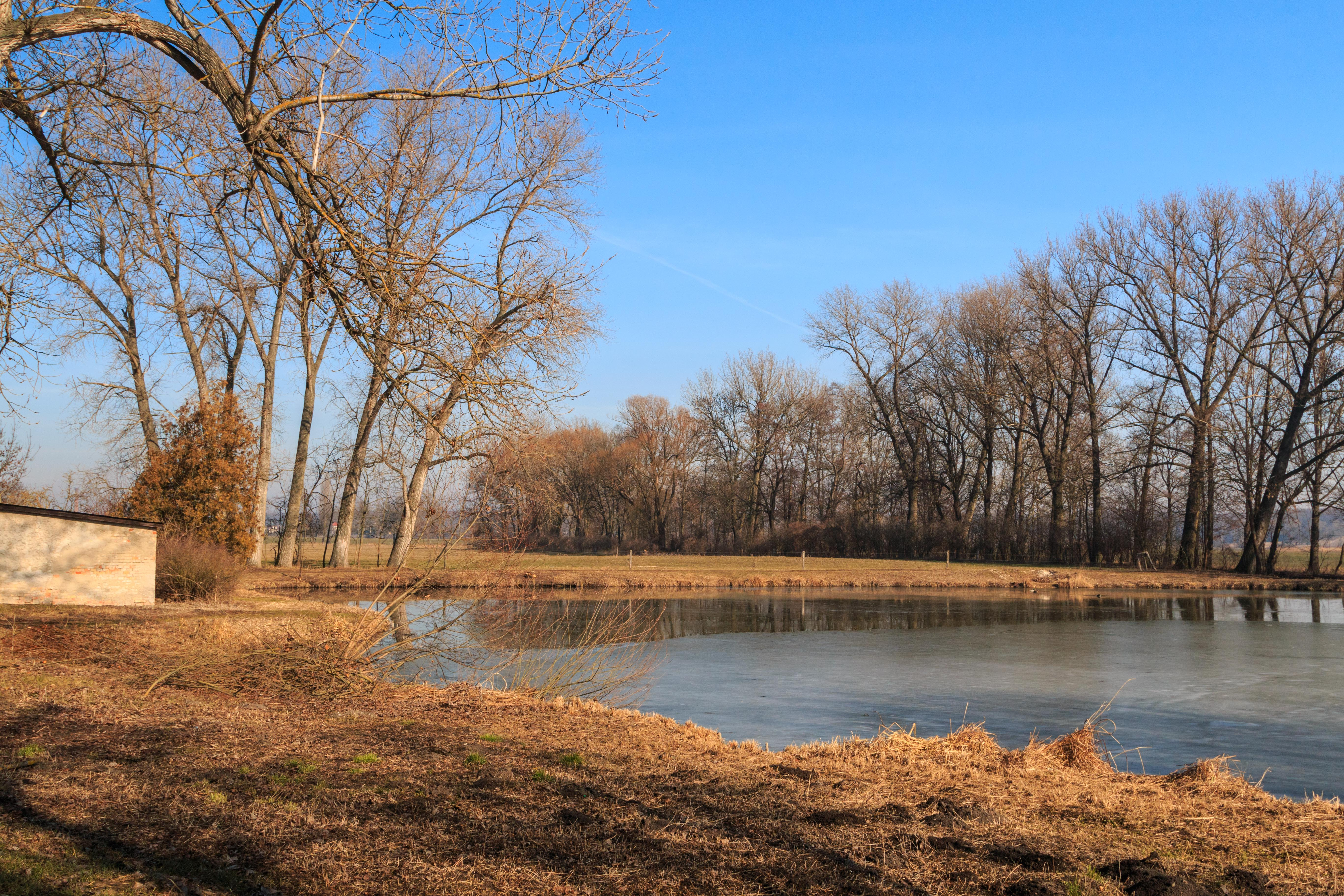 Pohled na Návesní rybník v Podlužanech Project: Vodstvo Ticket: 1711.